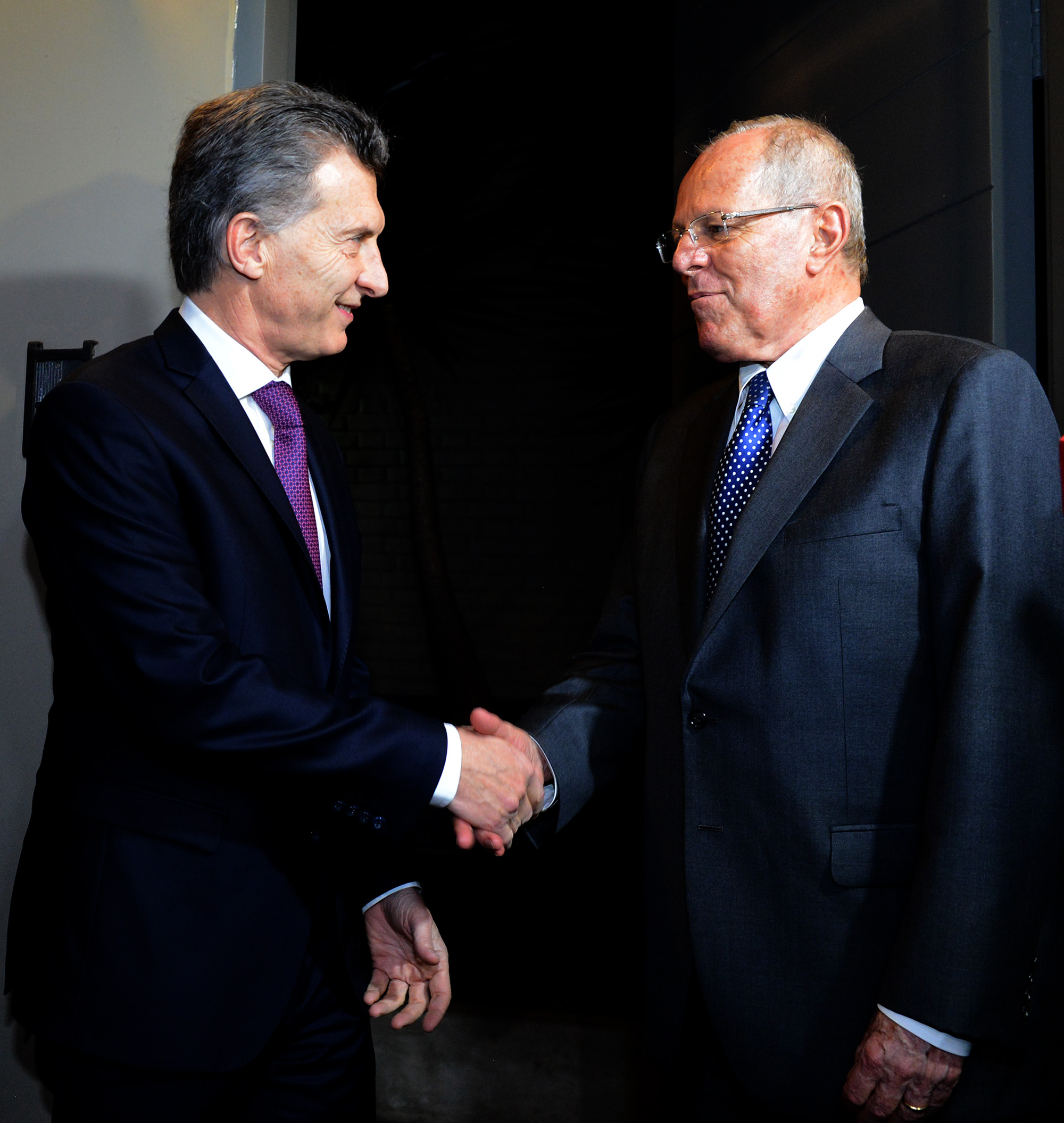 El presidente Mauricio Macri saludó, en Lima, a su par electo de Perú, Pedro Kuczynski, y dijo que espera “profundizar las muy lindas relaciones” que existen entre ambos países.